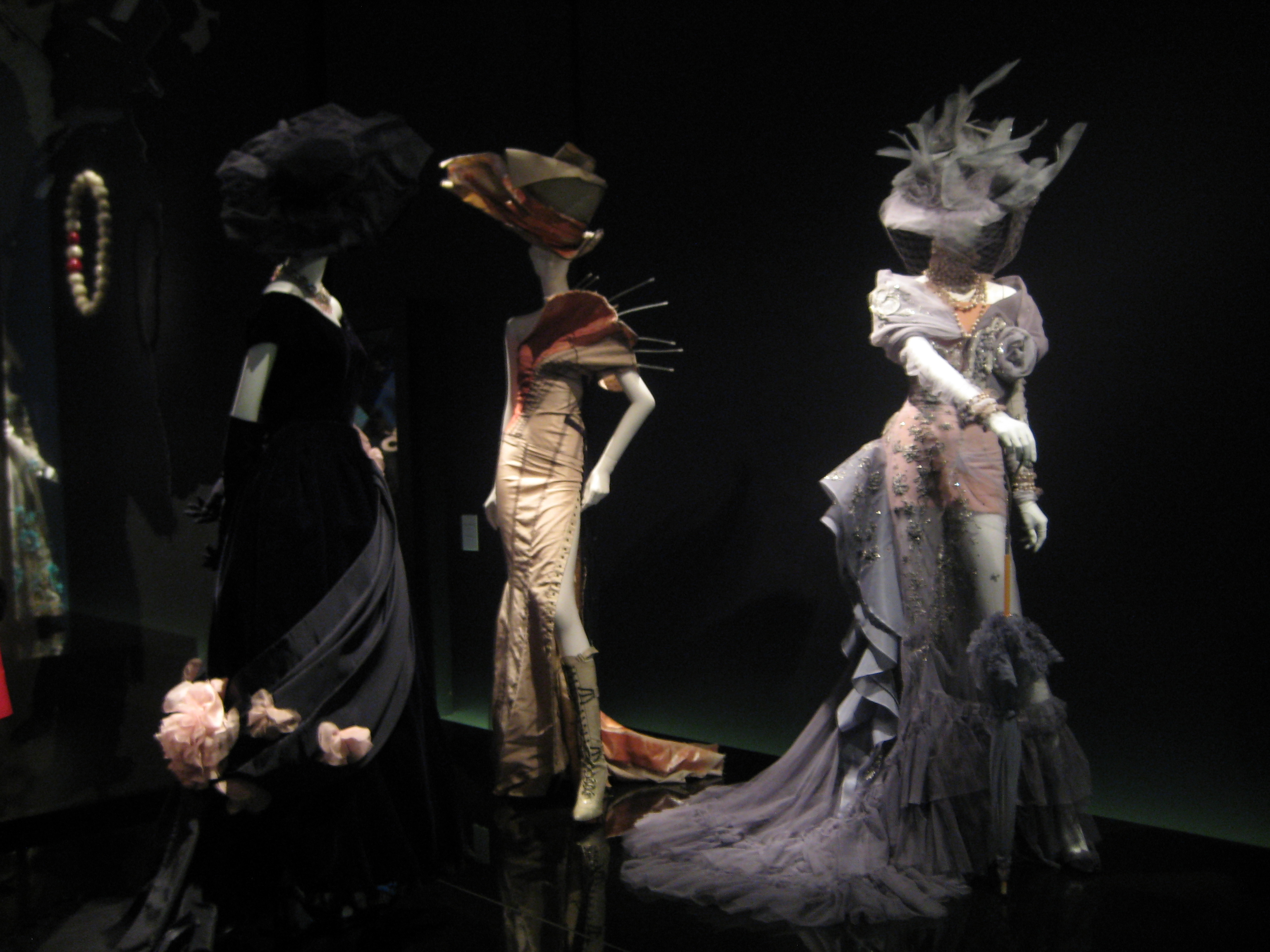 Выставка